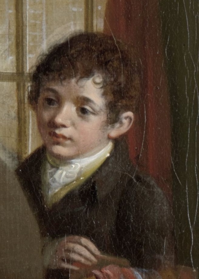 Portret van de familie van Adrianus Bonebakker met Dirk L. Bennewitz, Adriaan de Lelie, 1809. Bezoek van Dirk Lodewijk Bennewitz aan het echtpaar Adrianus en Elisabeth Bonebakker-Du Pré en hun kinderen. Een groepsportret van de familie Bonebakker en de compagnon Bennewitz, in de huiskamer van vermoedelijk Bonebakkers woning. Een dienstmeid in de deuropening brengt thee, achter haar is een doorkijk naar een kantoor. Door de twee ramen zijn grachtenhuizen te zien. Mevrouw Bonebakker houdt haar jongste op schoot, de overige vijf kinderen spelen met de baby, een boek, muziek en speelgoed. Dirk Lodewijk Bennewitz houdt een zilveren kastanjevaas of tabakspot in de hand, Adrianus Bonebakker een brief of document. Twee zilveren manden op de grond en op een krukje verwijzen naar de firma Bonebakker en Bennewitz, zilversmeden te Amsterdam. Aan de muur hangen twee schilderijen: arcadisch landschap met ondergaande zon door Daniël Dupré en gezicht op Civita Castellana door Daniël Dupré.